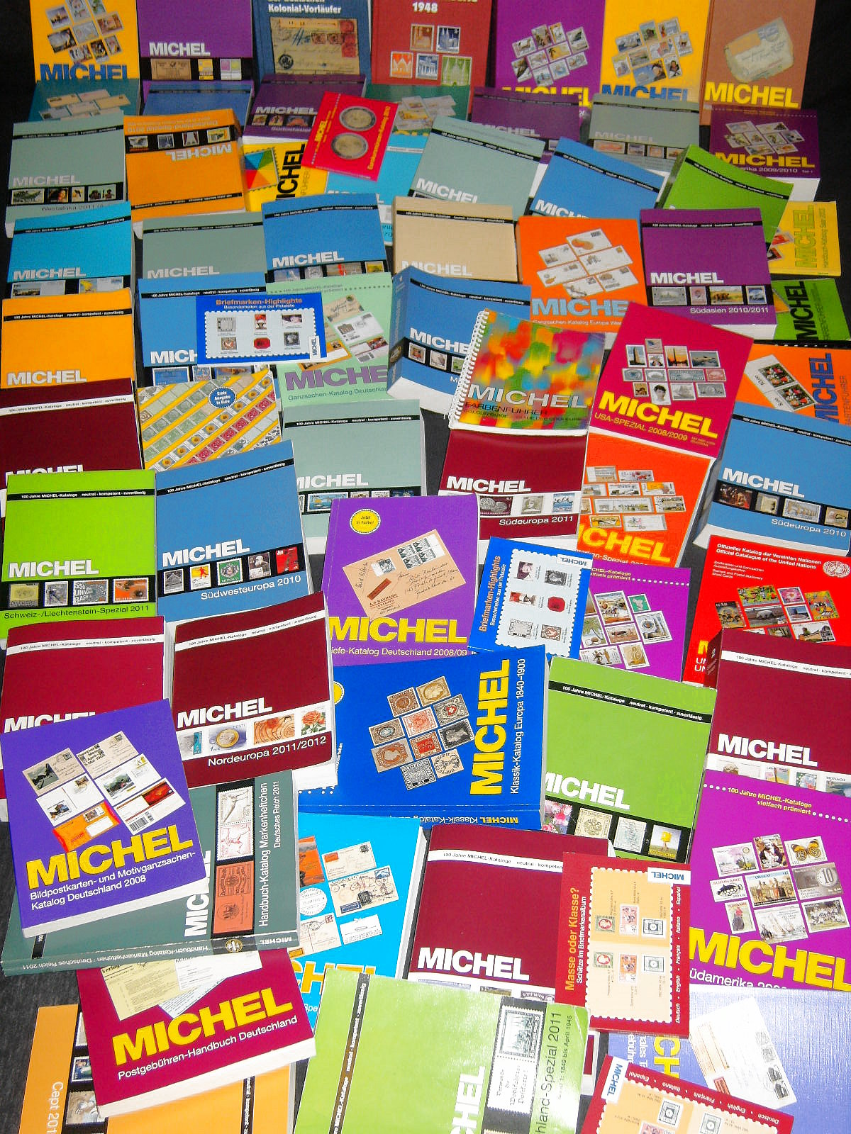 Auf einer Fläche wie hingeworfen wirkender kunterbunter Haufen von verschiedenen Michel-Katalogen des Ausgabestandes Sommer 2011 zur Darstellung der Vielfalt von Michel-Katalogen